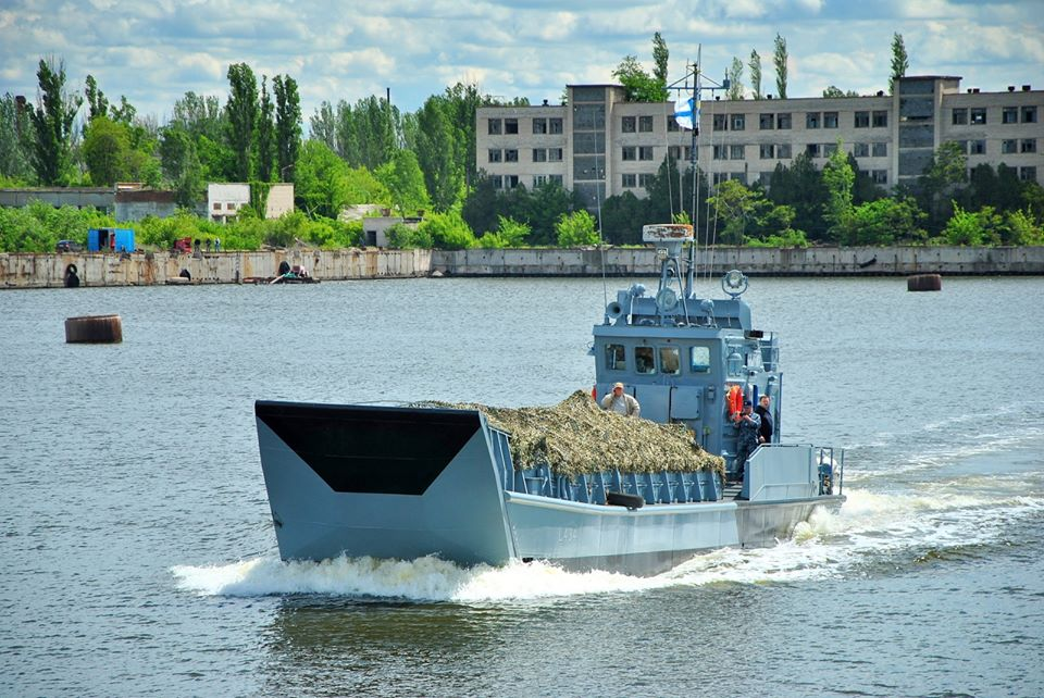 Після капітального ремонту на Миколаївському суднобудівному заводі вийшов на службу десантний катер «Сватове». Під час ремонту було повністю відновлено конструкції корпусу та зовнішню обшивку, відремонтовано систему головного двигуна, валопроводи, гвинто-стернову систему, якірно-швартовну систему, механізм десантної апарелі, електромеханічну частину тощо.